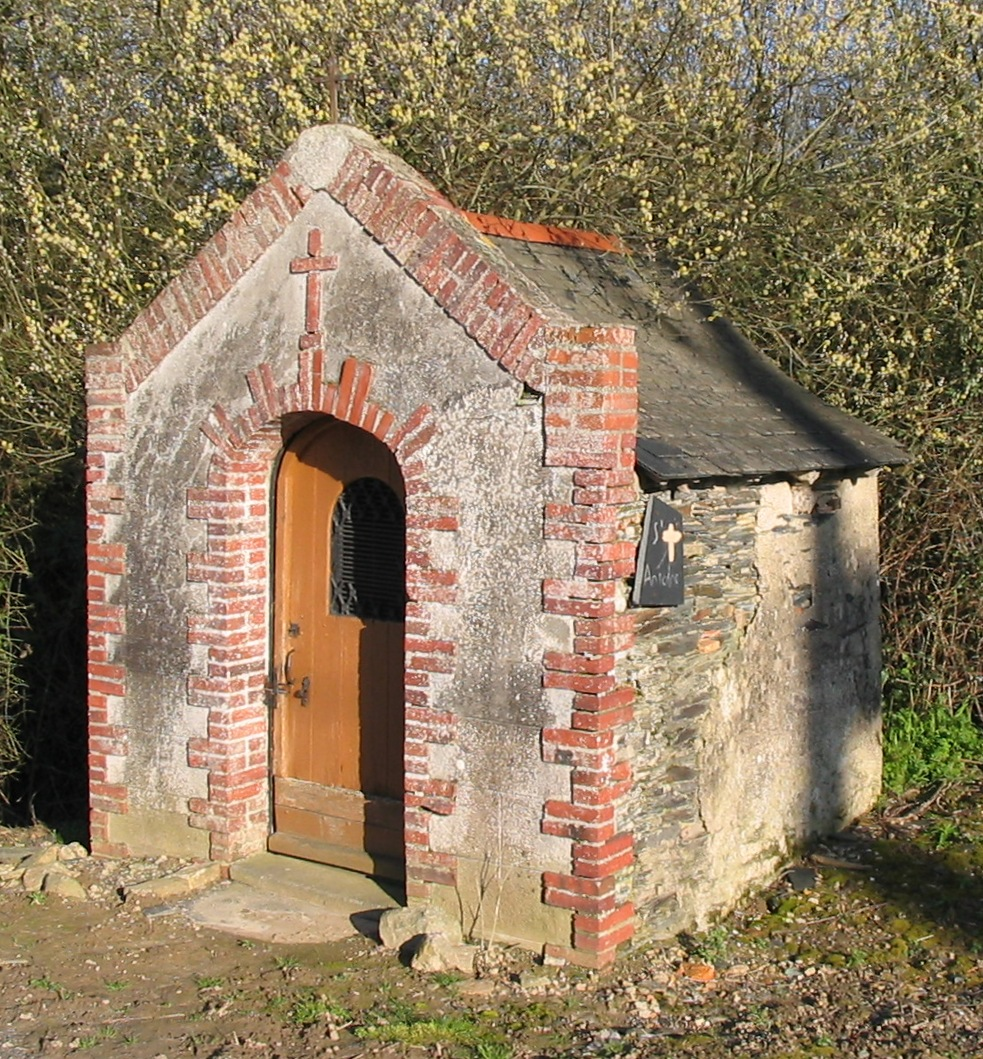 Oratoire de St Antoine, la Pouëze en Maine-et-Loire